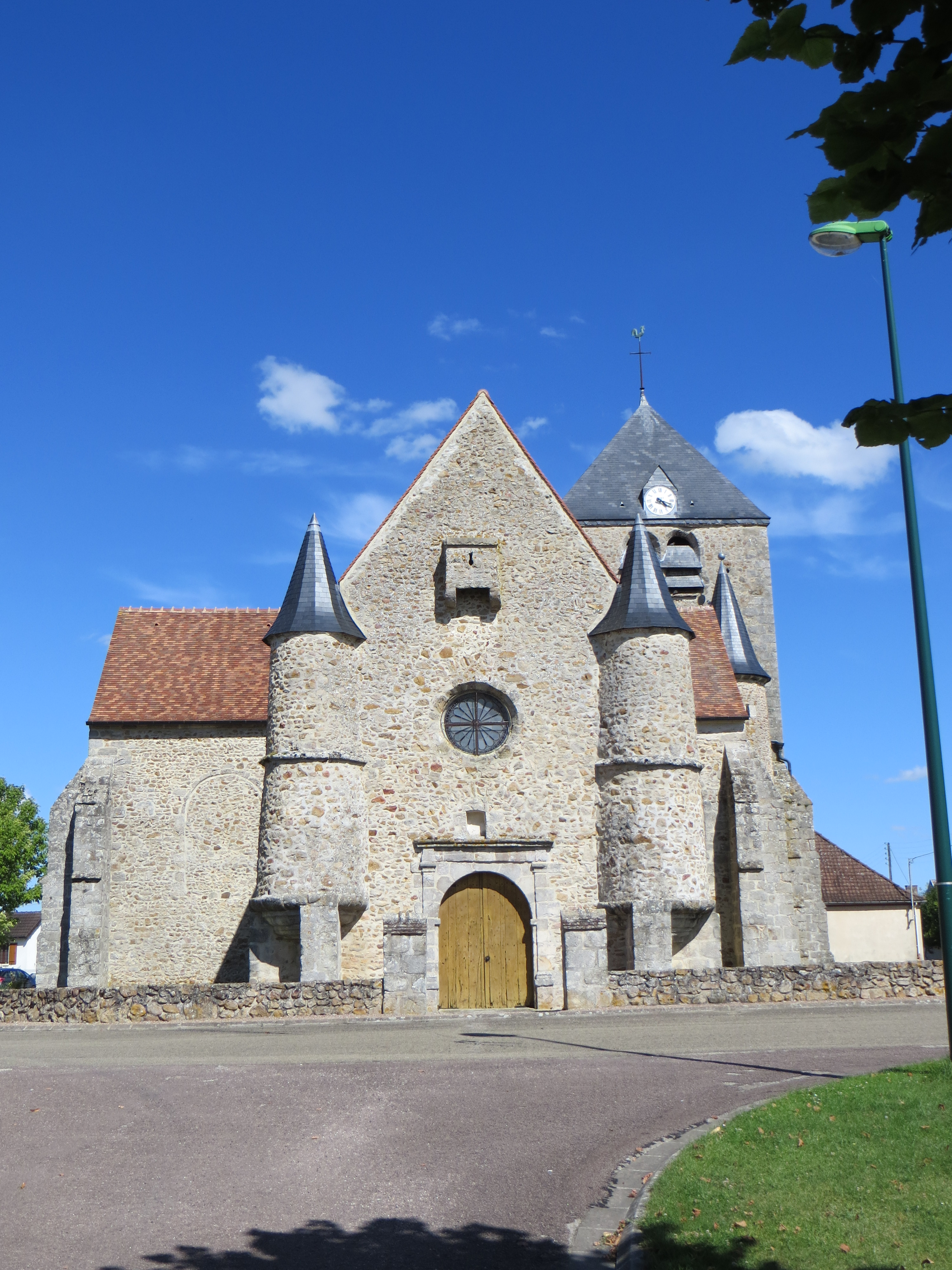 Vue de l'église